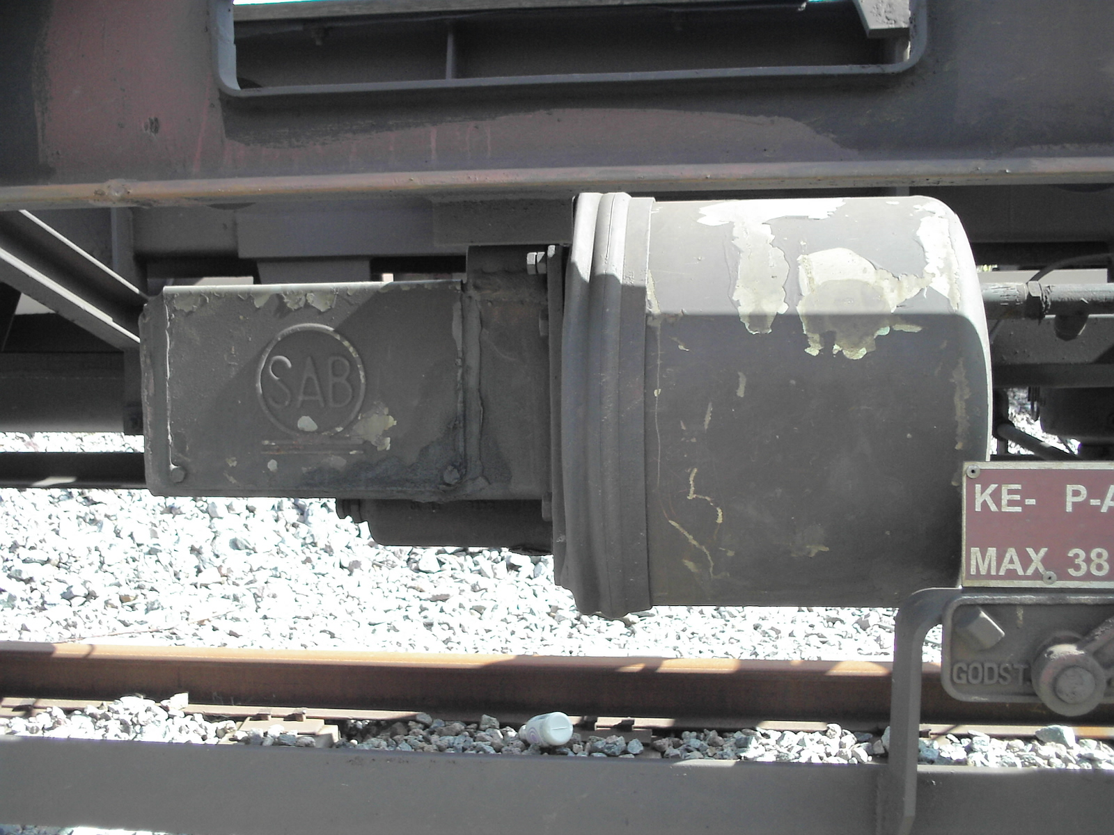 Bromscylinder